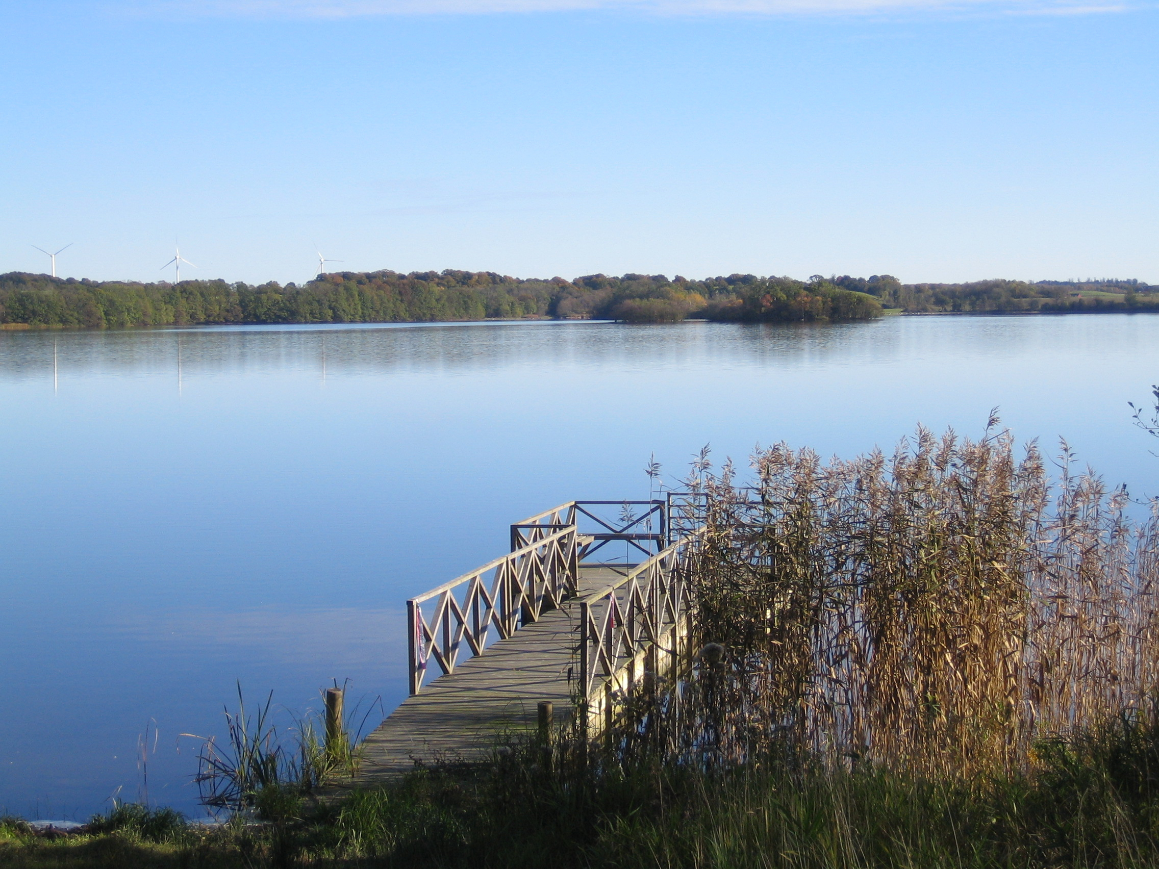 Ellestadssjön, Skåne, Sweden.